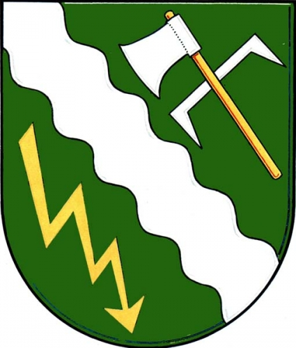 znak, Kramolín, okres Třebíč